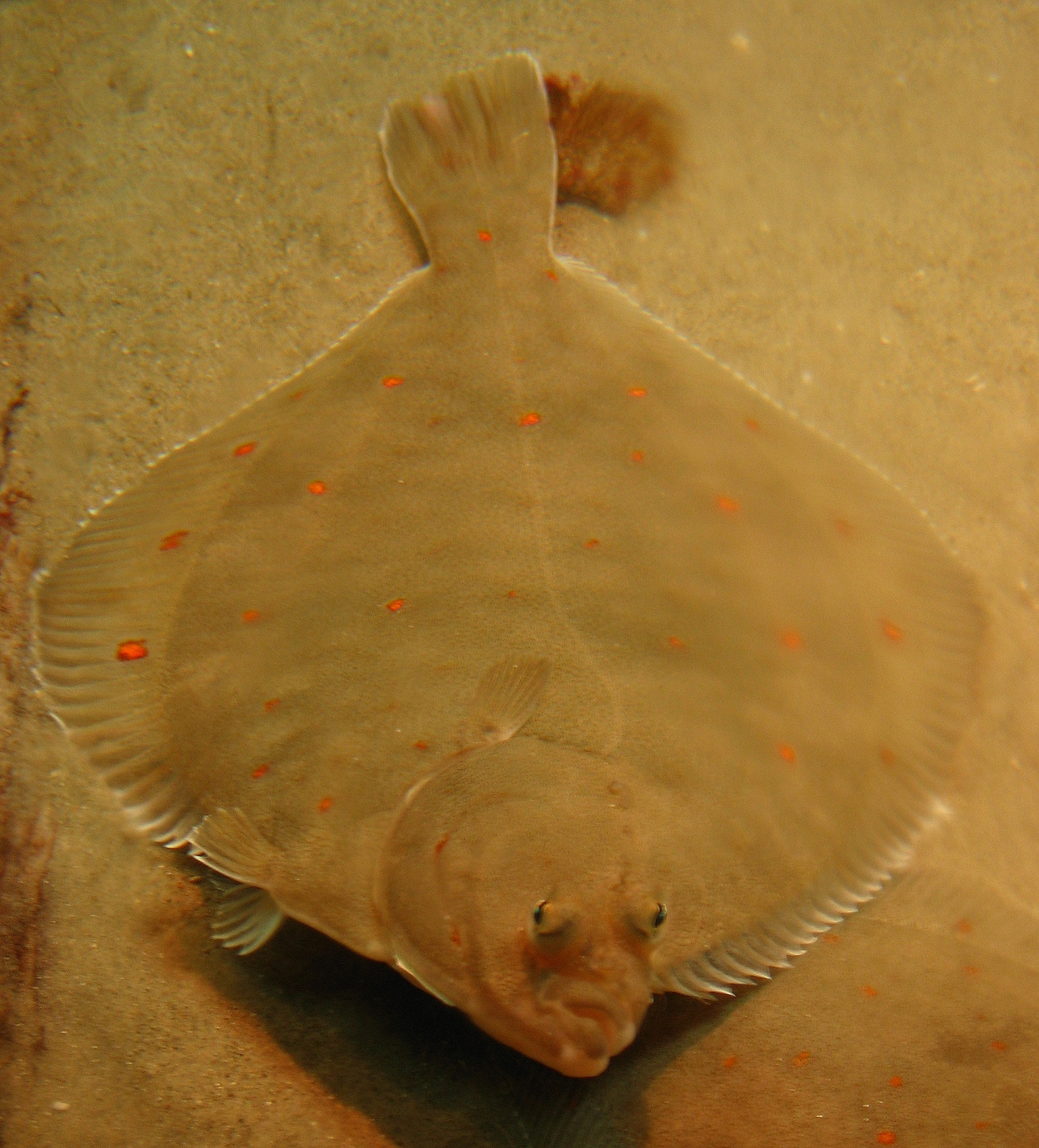 Pleuronectes platessa in Nausicaä Centre National de la Mer